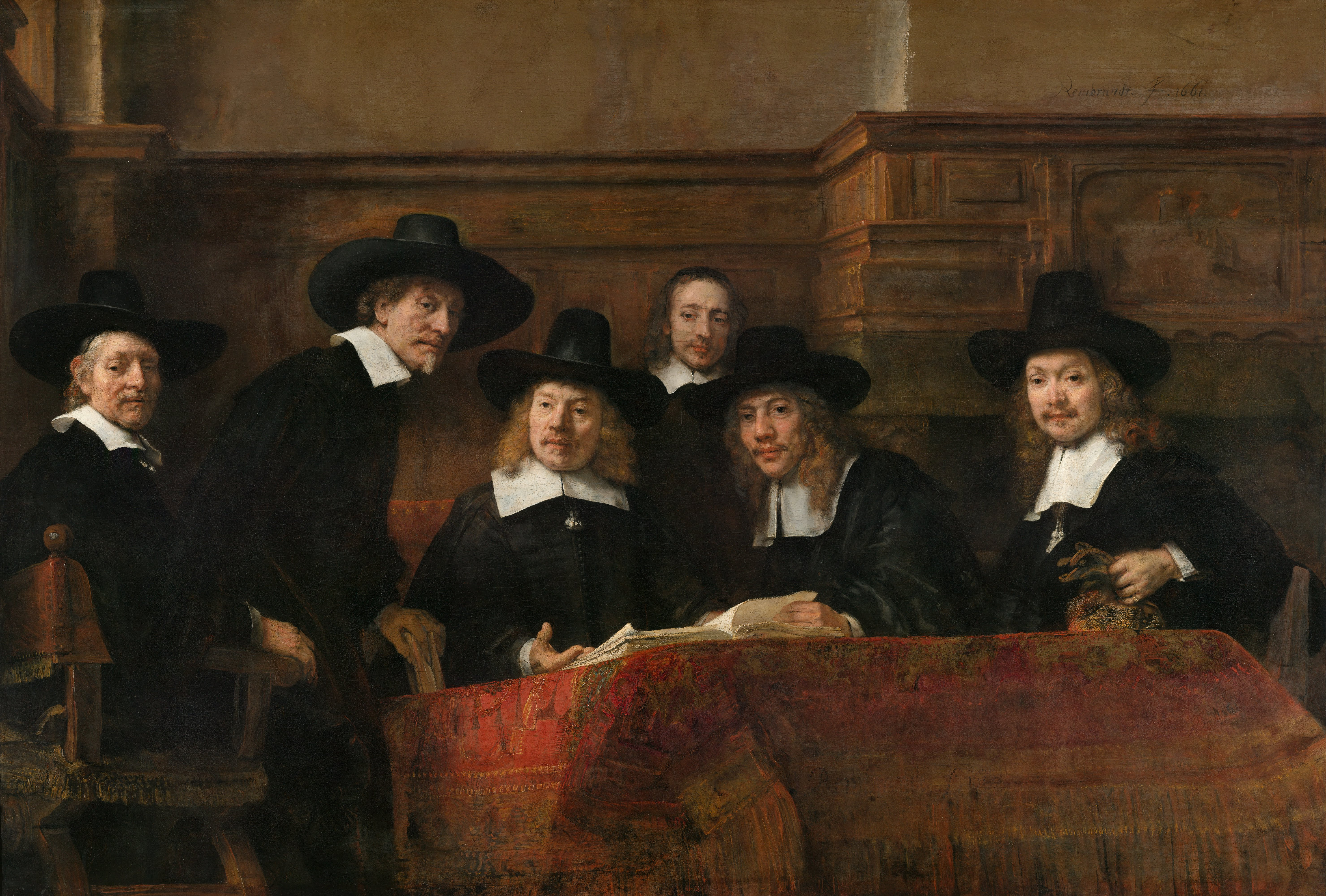 De Staalmeesters: het college van staalmeesters (waardijns) van het Amsterdamse lakenbereidersgilde, bijeen rond een tafel waarop een Perzisch kleed ligt, op tafel het opengeslagen stalenboek. Voorgesteld zijn (van links naar rechts): Jacob van Loon (1595-1674), Volckert Jansz (1605/10-81), Willem van Doeyenburg (ca. 1616-87), de knecht Frans Hendricksz Bel (1629-1701), Aernout van der Mye (ca. 1625-81) en Jochem de Neve (1629-81). Rechts boven de haard een schilderij met een brandend baken.